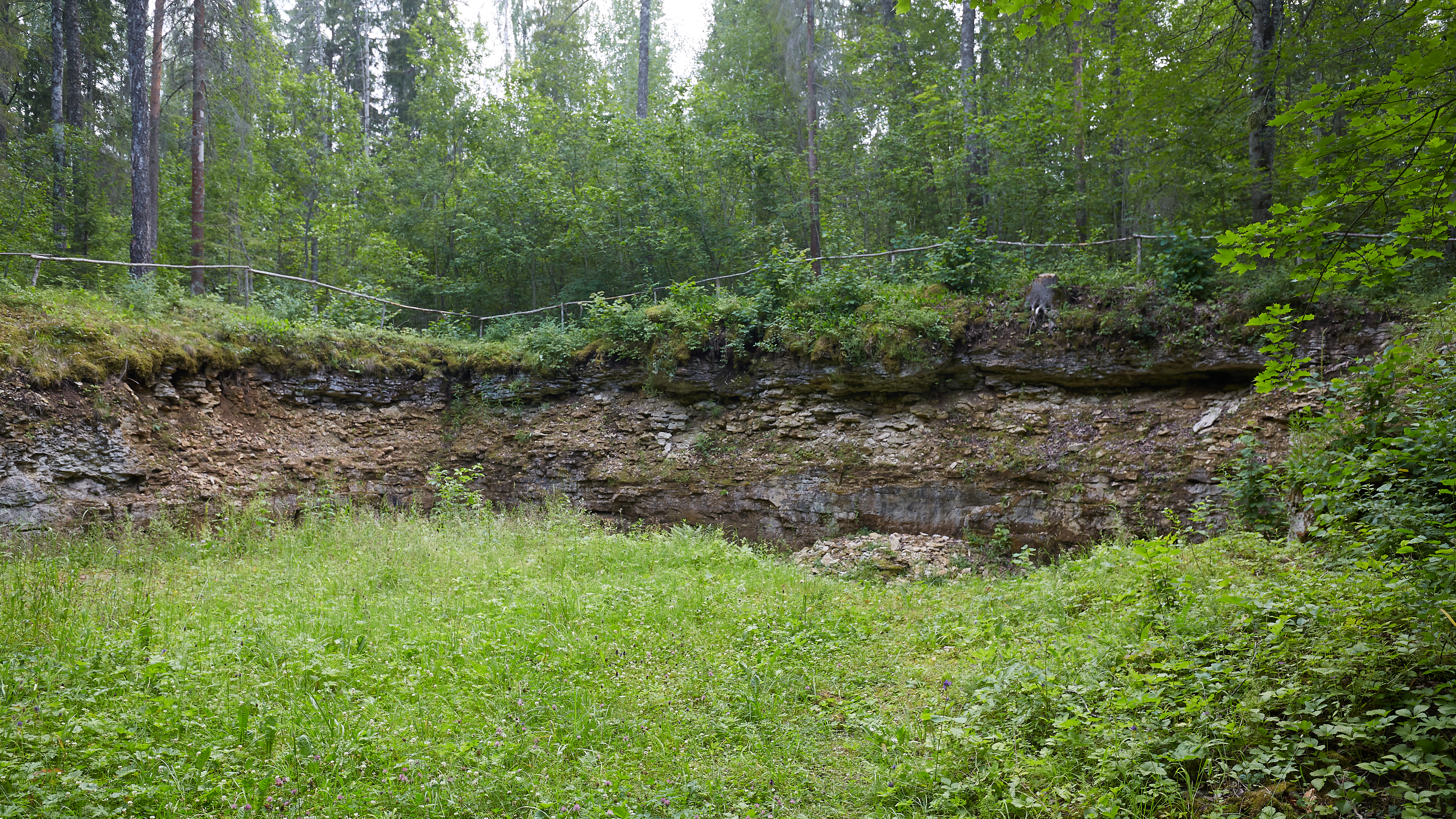 Porkuni lade Porkunis